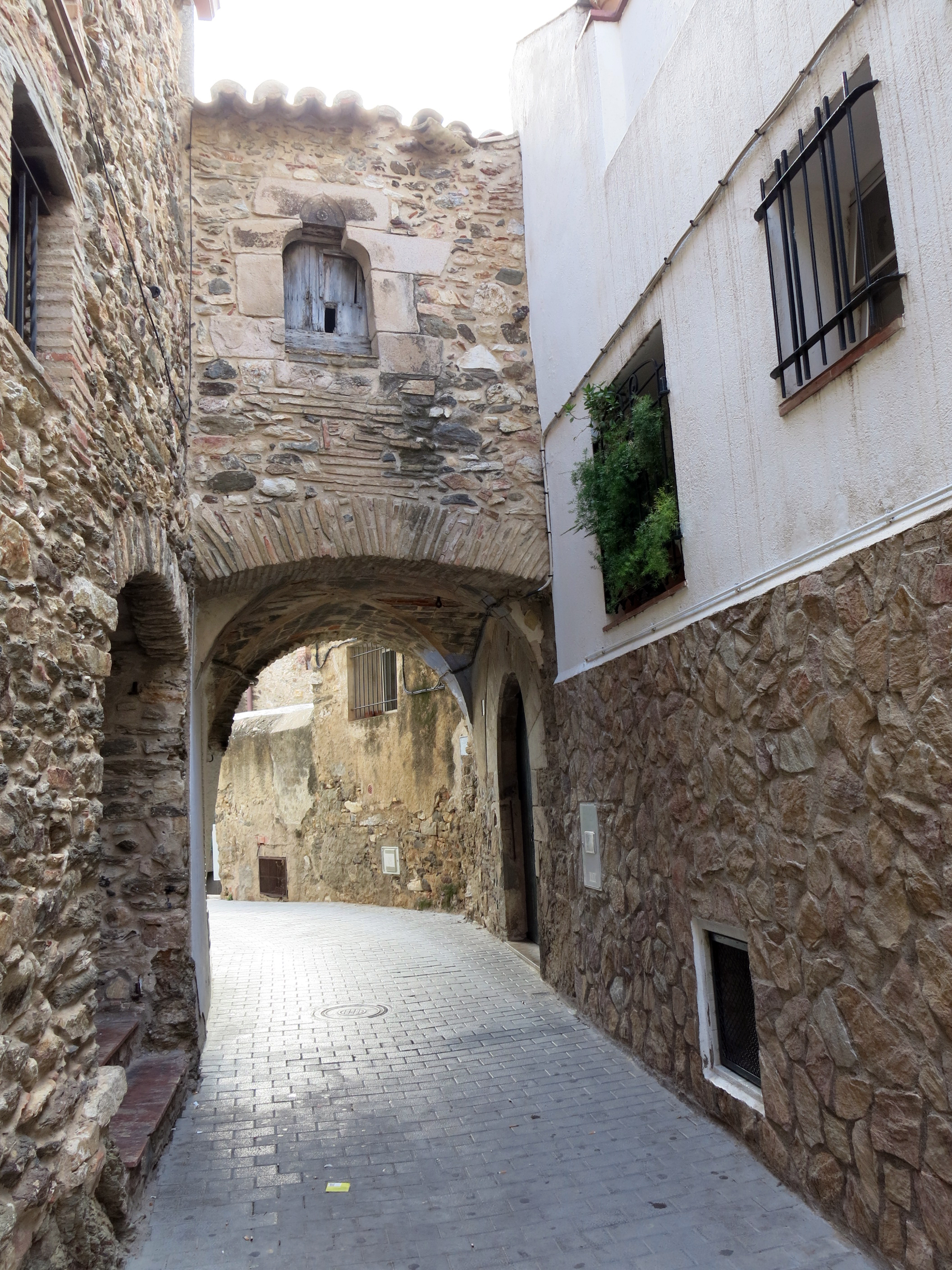 Dins la Vila - la Corralassa (Llançà)